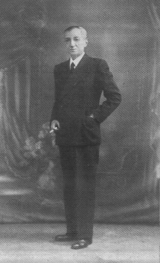 Annibale Commessatti (1886-1945)